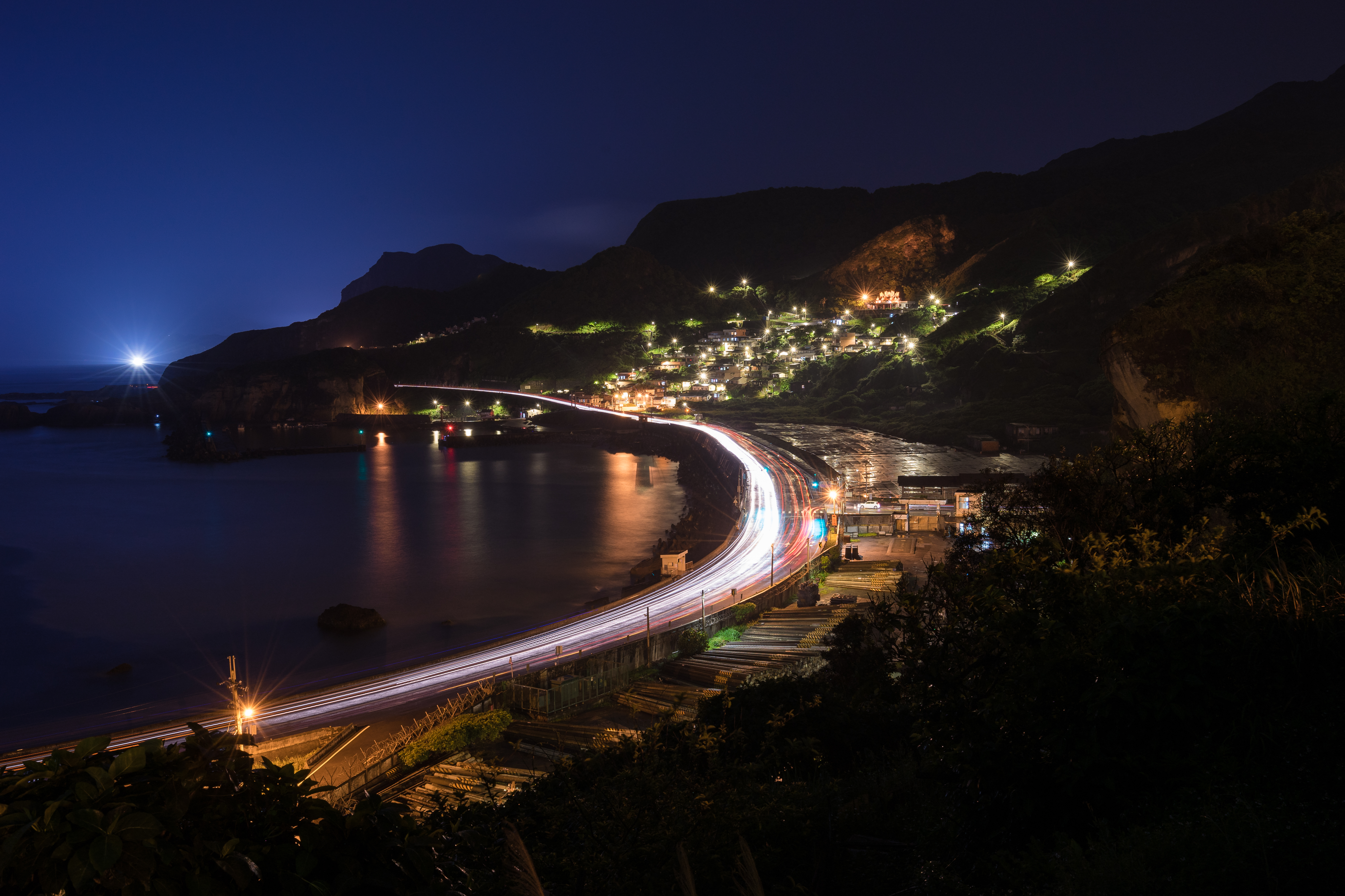 中文（台灣）: 濂新里長仁社區